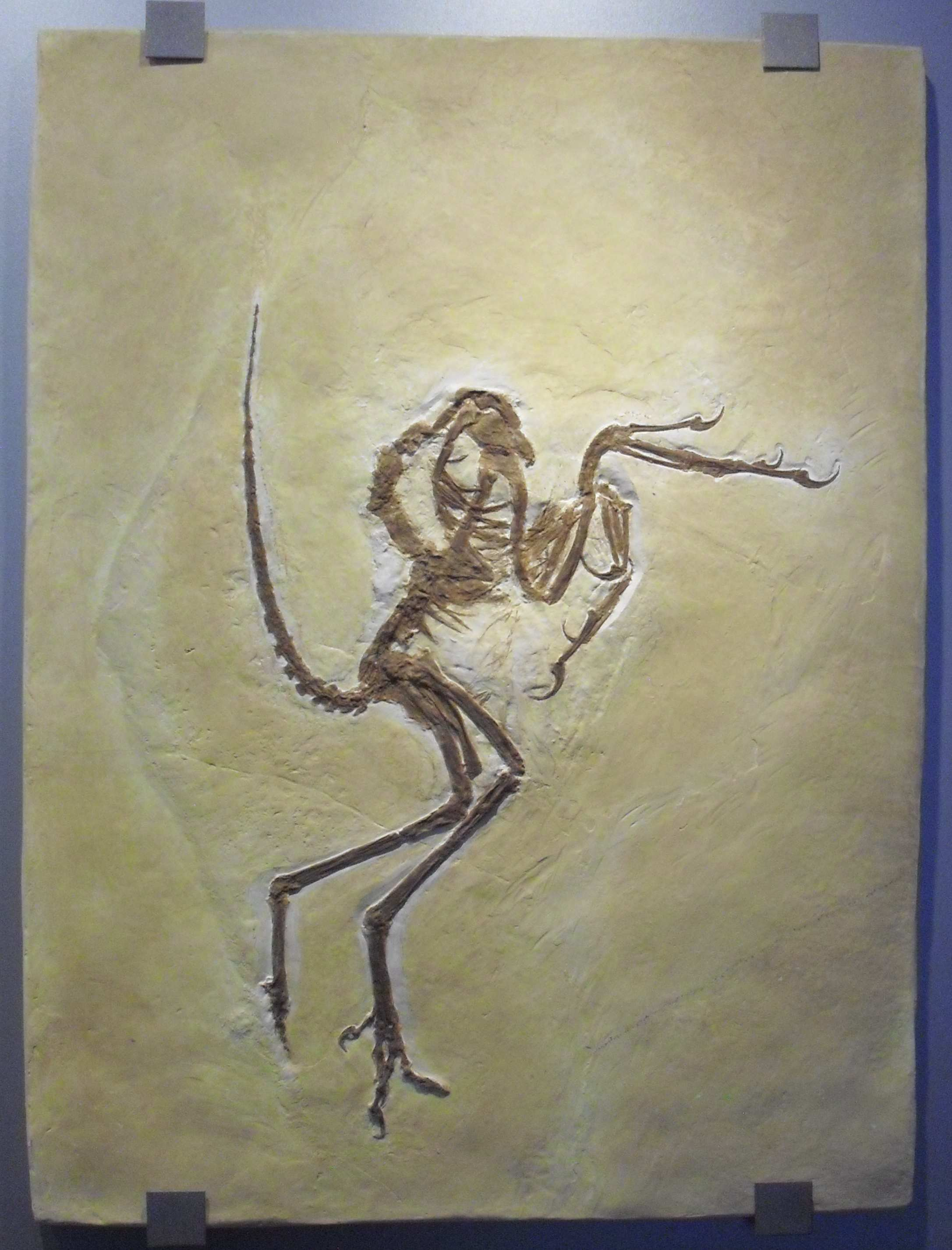 Wellnhoferia_grandis, Jura-Museum Eichstätt, eigene Gattung, ursprünglich als Archaeopteryx beschrieben